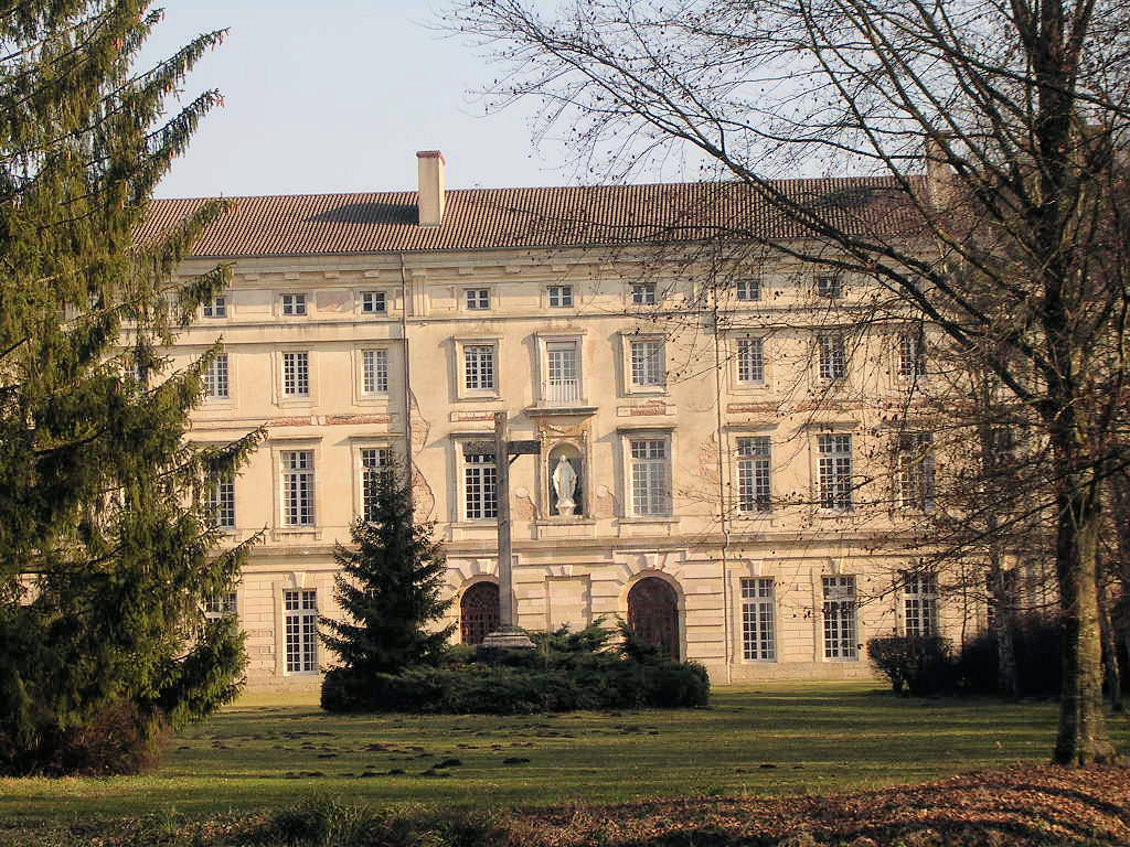 France - Bourgogne - Abbaye de Cîteaux - L'abbatiale ou bâtiment Lenoir. Du à L'architecte Samson-Nicolas Lenoir le Romain. Édifié sous l'abbatiat de Dom François Trouvé achevé en 1771